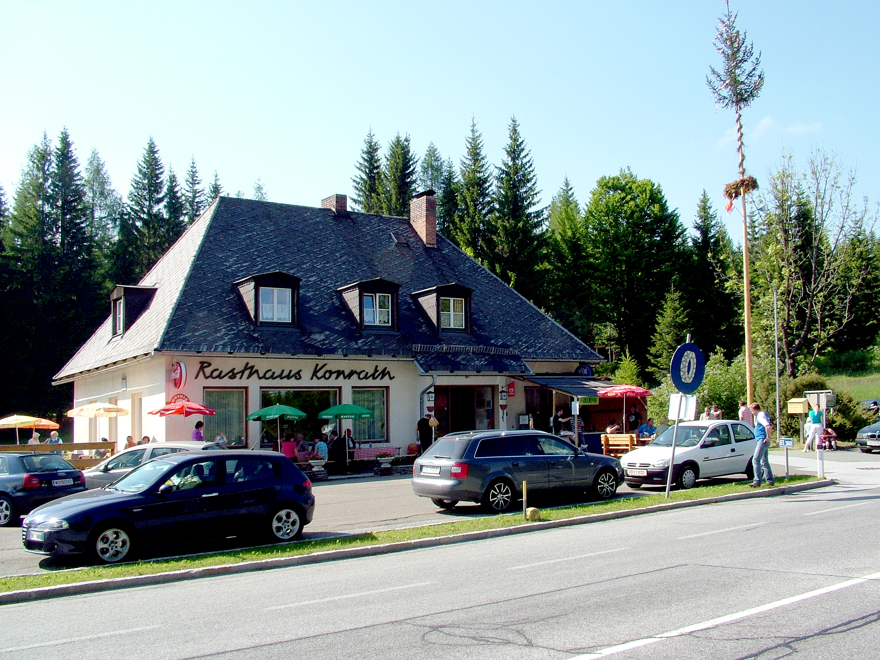 Packsattel (Pack, Ausztria)